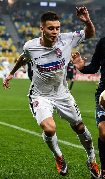 Заря - Герта 2:1